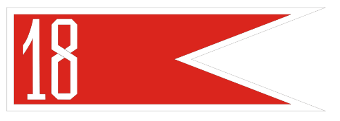 18 Dywizja Zmechanizowana – proporczyk na beret Dowództwa 18 DZ – 2019, Polska.